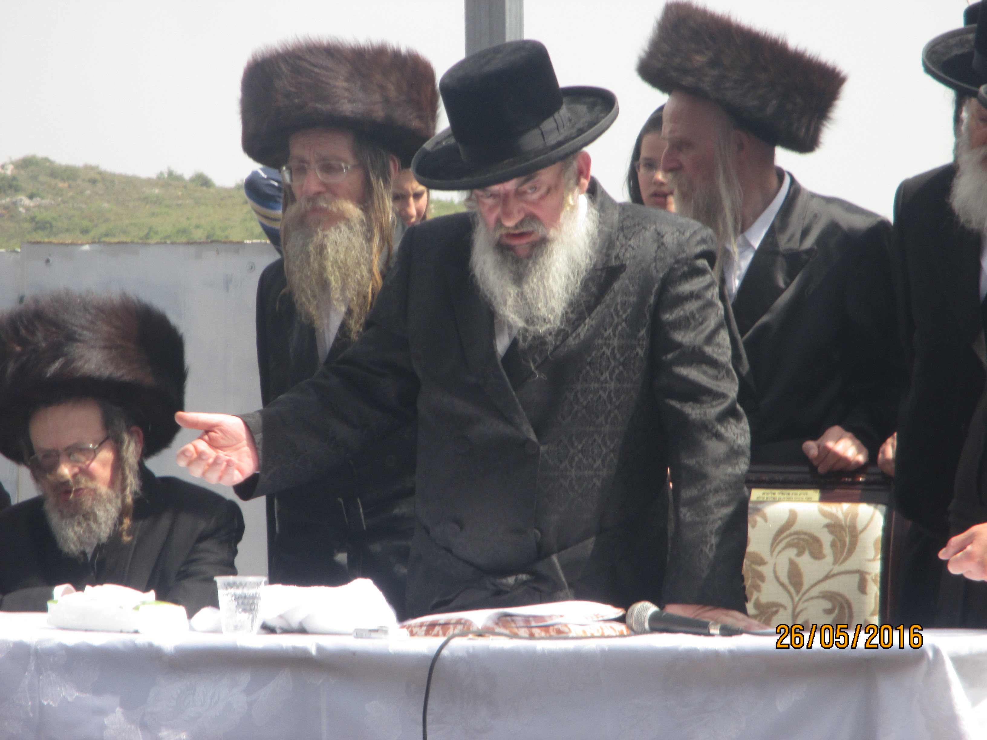 האדמו"ר בהדלקת מדורה לכבוד התנה האלוקי רבי שמעון בר יוחאי במירון